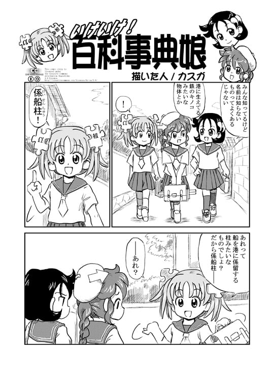 pixiv より 二年ぐらい昔に、後輩の合同誌で描いたウィキペたん漫画。 （「ウィキペたん」が何か知らない人は、ウィキペディアで検索だ） こんなもん再利用する人はいないと思いますが、 「クリエイティブ・コモンズ 表示-継承 3.0」のライセンスで配布してます。 しかし、この子ってこういうキャラだったんだね。